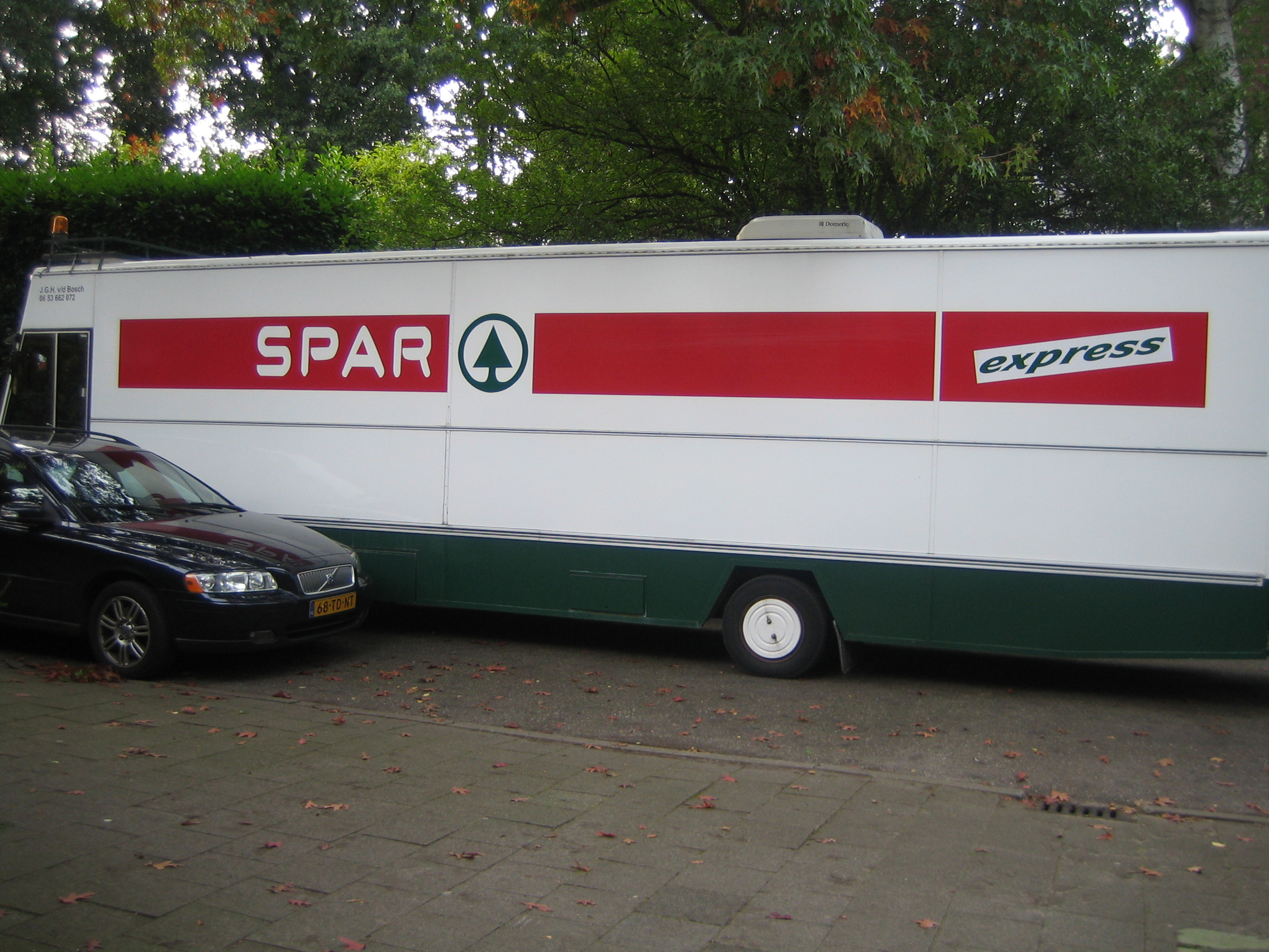 Een winkelwagen van Spar.